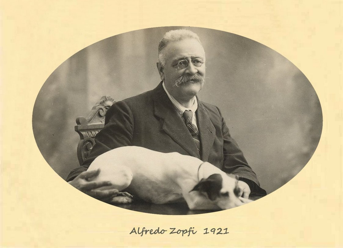 Alfredo Zopfi ritratto col suo cane 1921